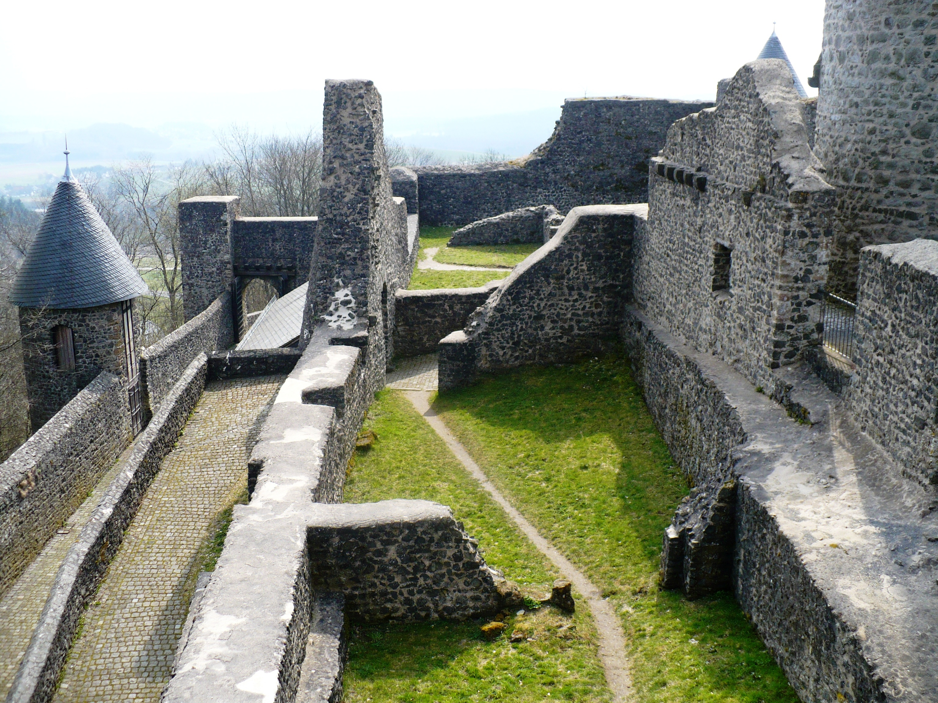 Ruinen im Innenbereich der Nürburg